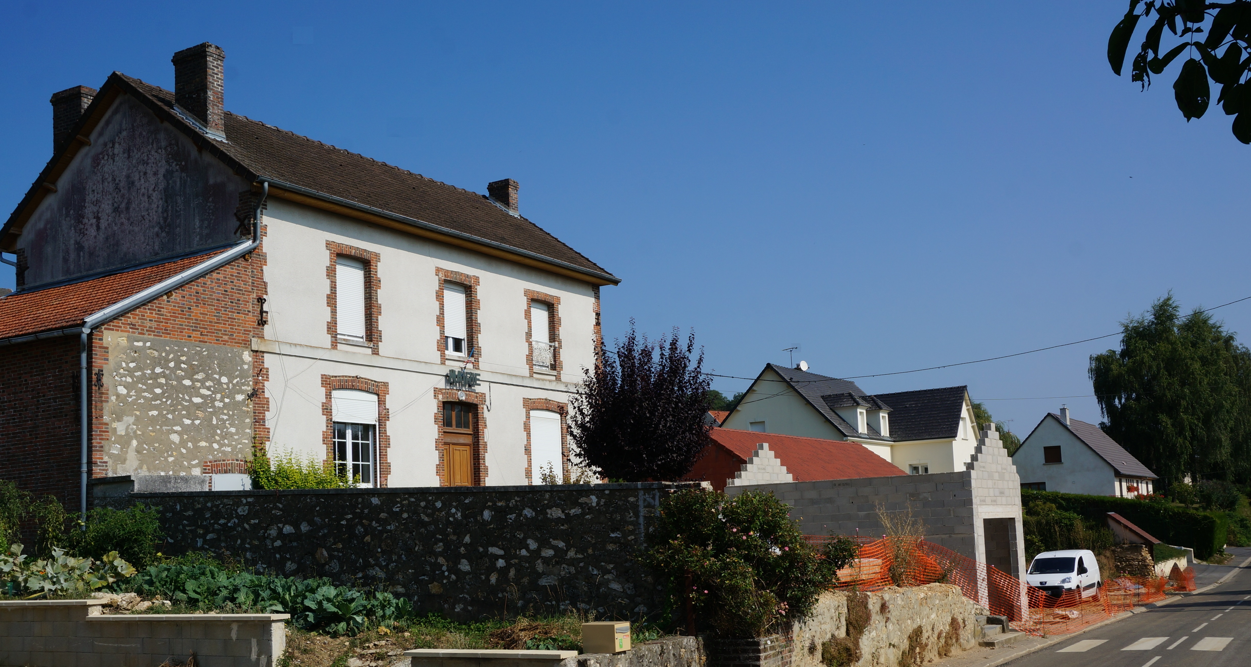 vue de Morangis (Marne).